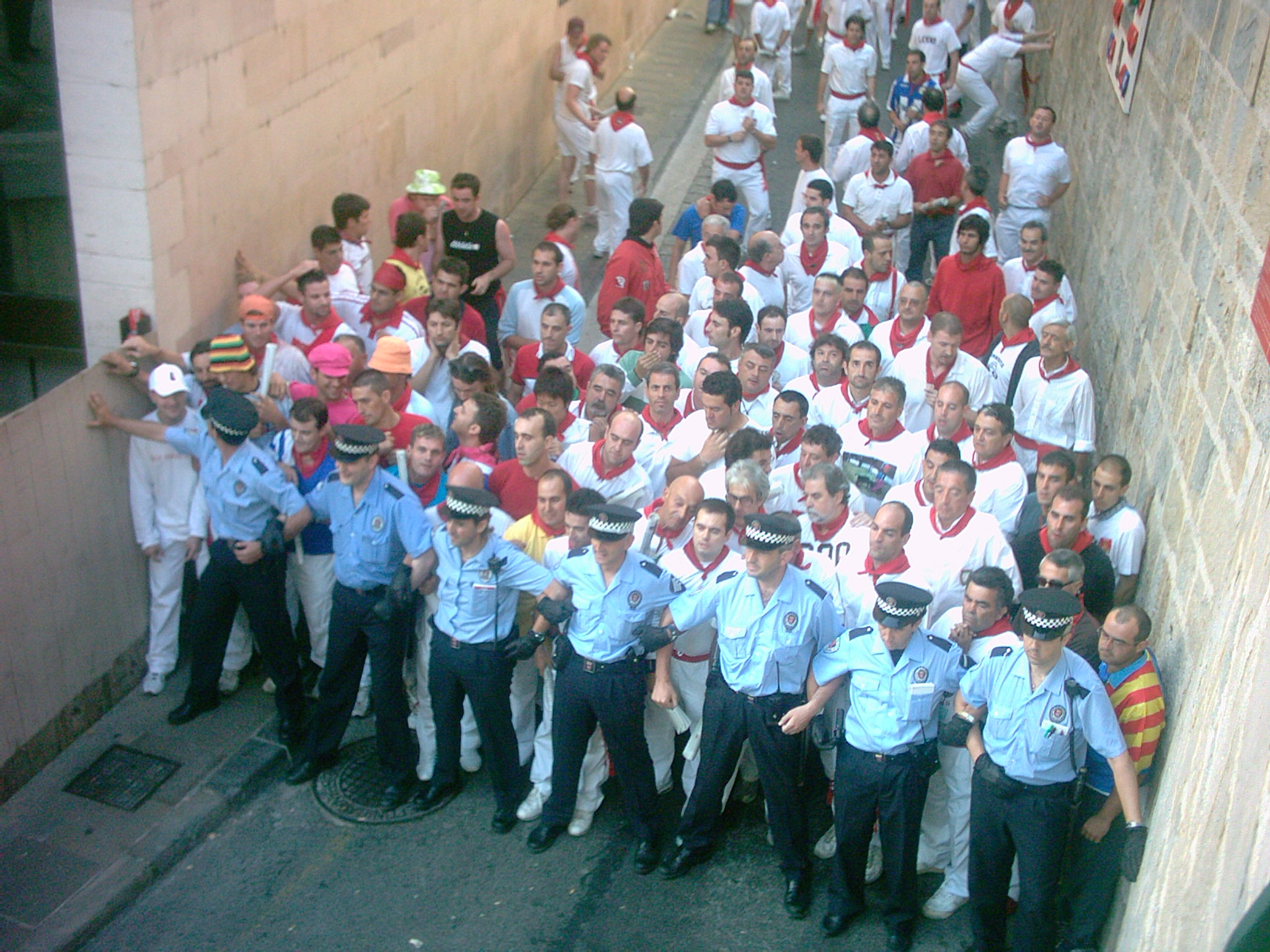 Cordón de la policía municipal al inicio de un encierro en las fiestas de San Fermín en 2006.